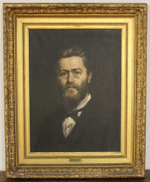 Gemälde 60x44 cm: Portrait des französischen Ägyptologen Urbain Bouriant (1849-1903)